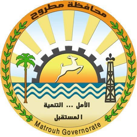 شعار محافظة مطروح